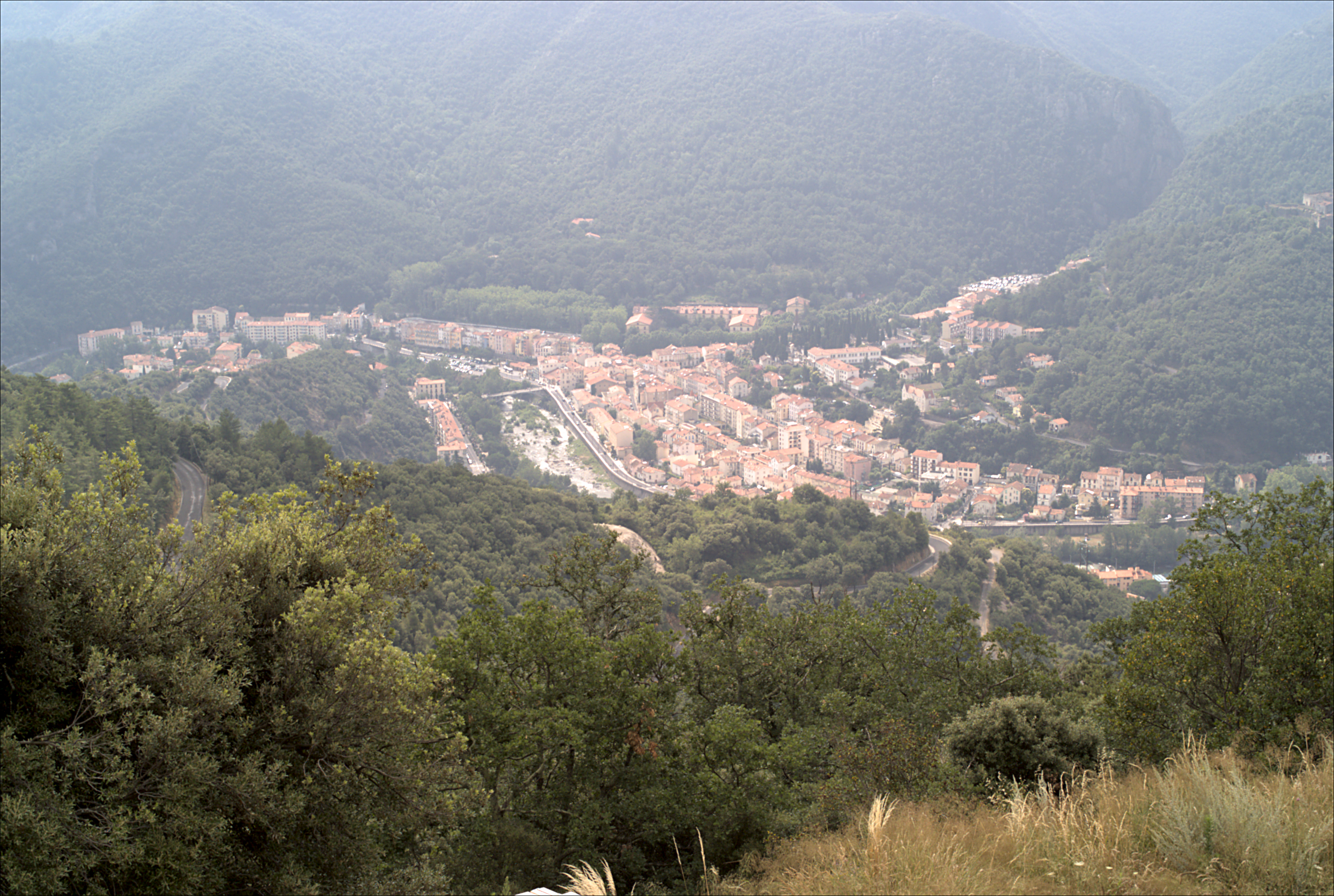 Vue d'Amélie-les-Bains depuis Montbolo (Pyrénées-Orientales, Languedoc-Roussillon, France)